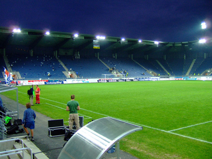 Viking Stadion, Stavanger Norway